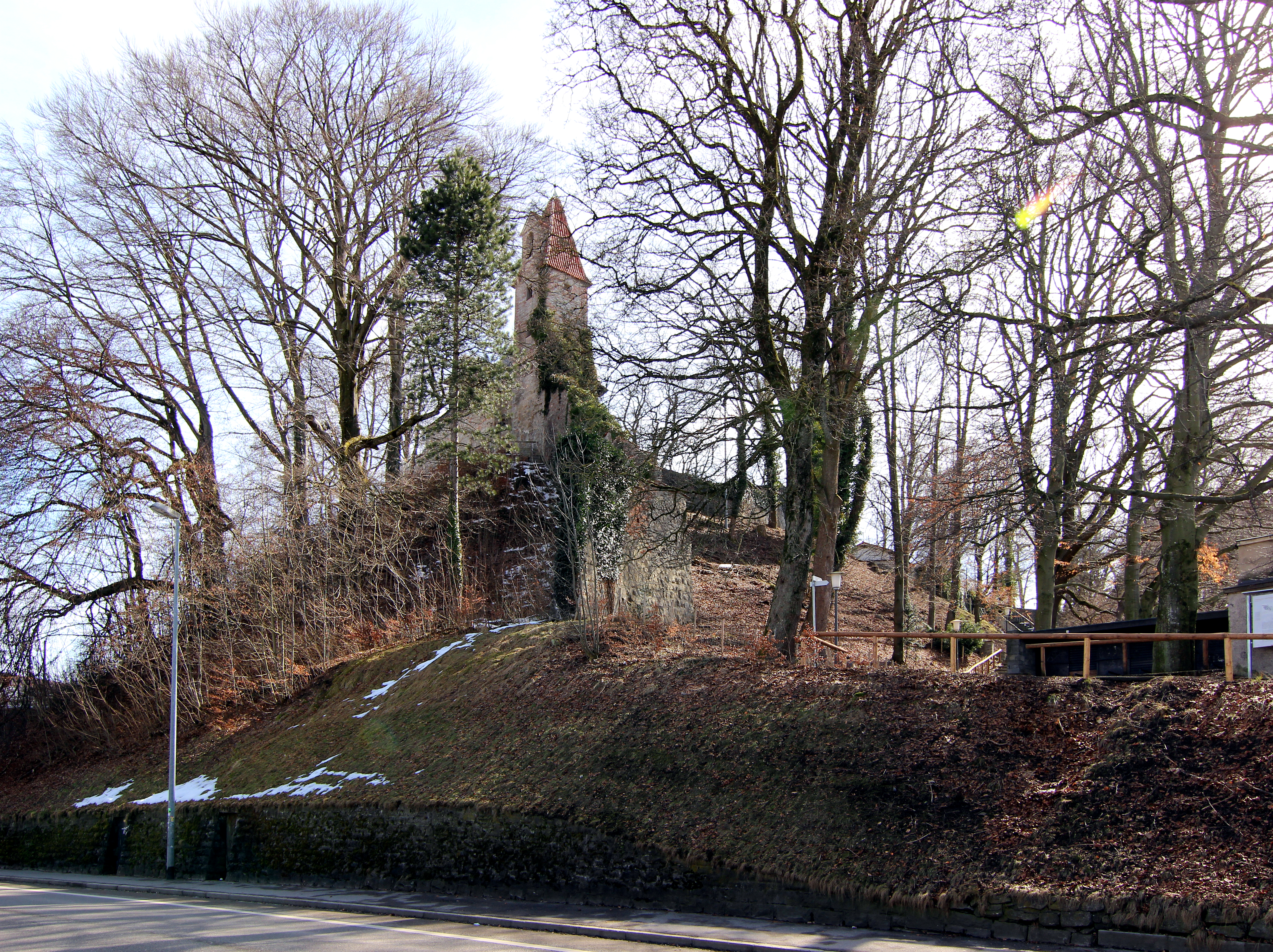 Burghalde in Kempten, vom Nordwesten aus fotografiert